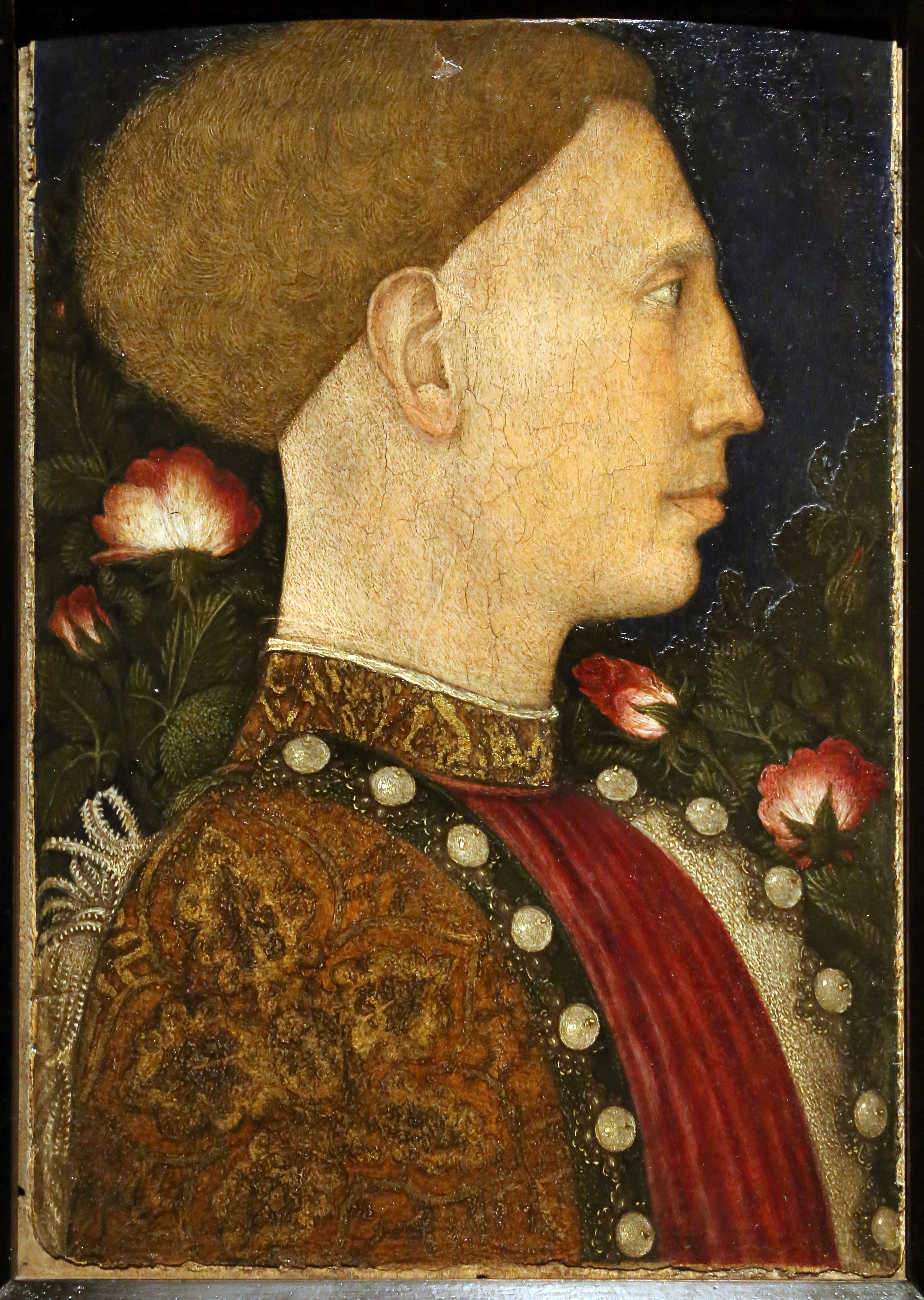 Palazzo dei Diamanti (Ferrara) This is a photo of a monument which is part of cultural heritage of Italy.